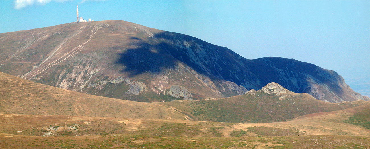 Първенецът на Стара планина, вр.Ботев